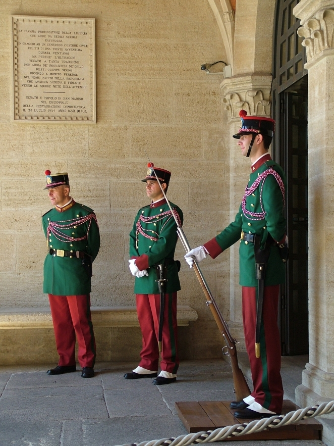 La Guardia di Rocca in servizio presso l'entrata del Palazzo pubblico di San Marino.